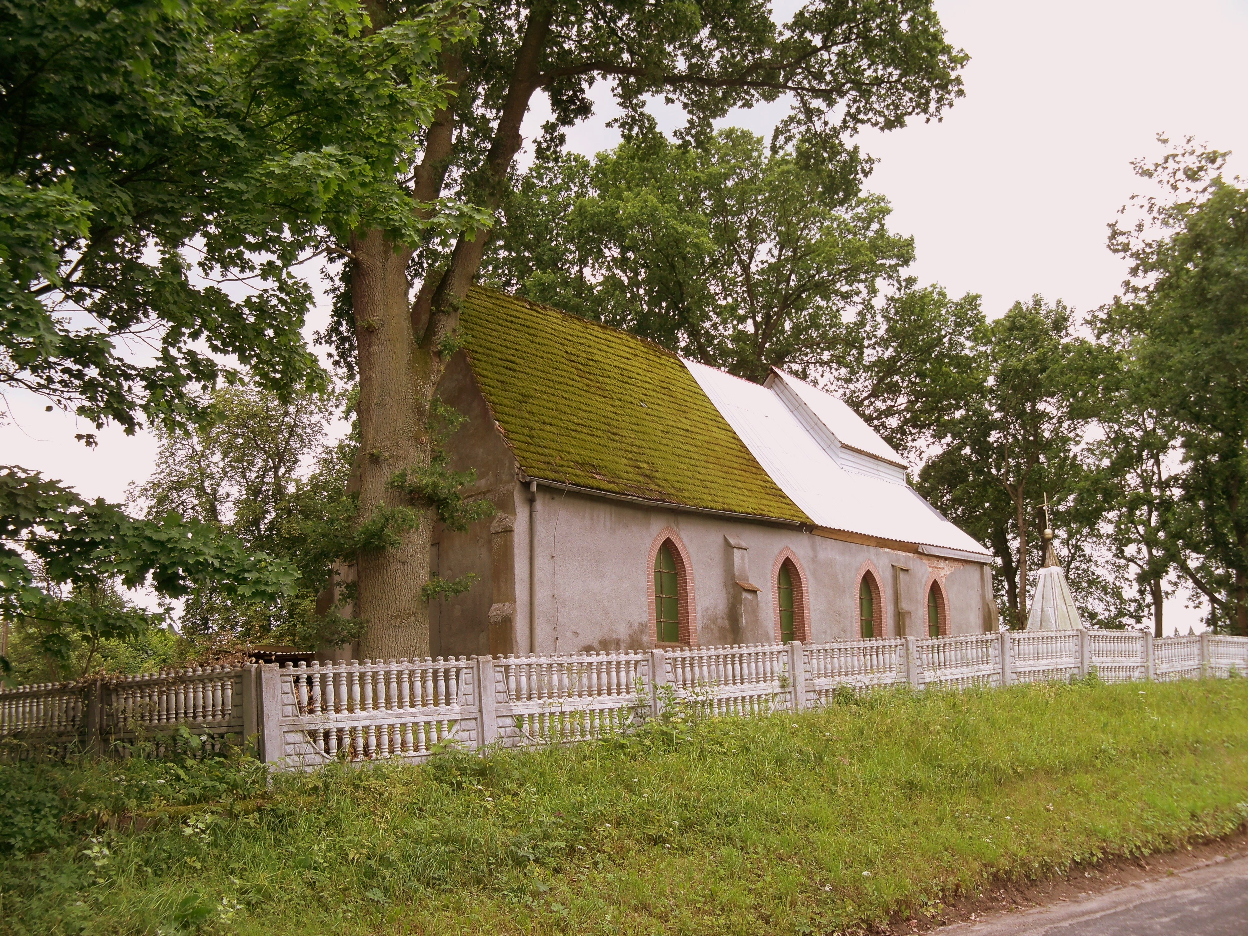 Kościół w Żytelkowie w trakcie remontu - czerwiec 2012